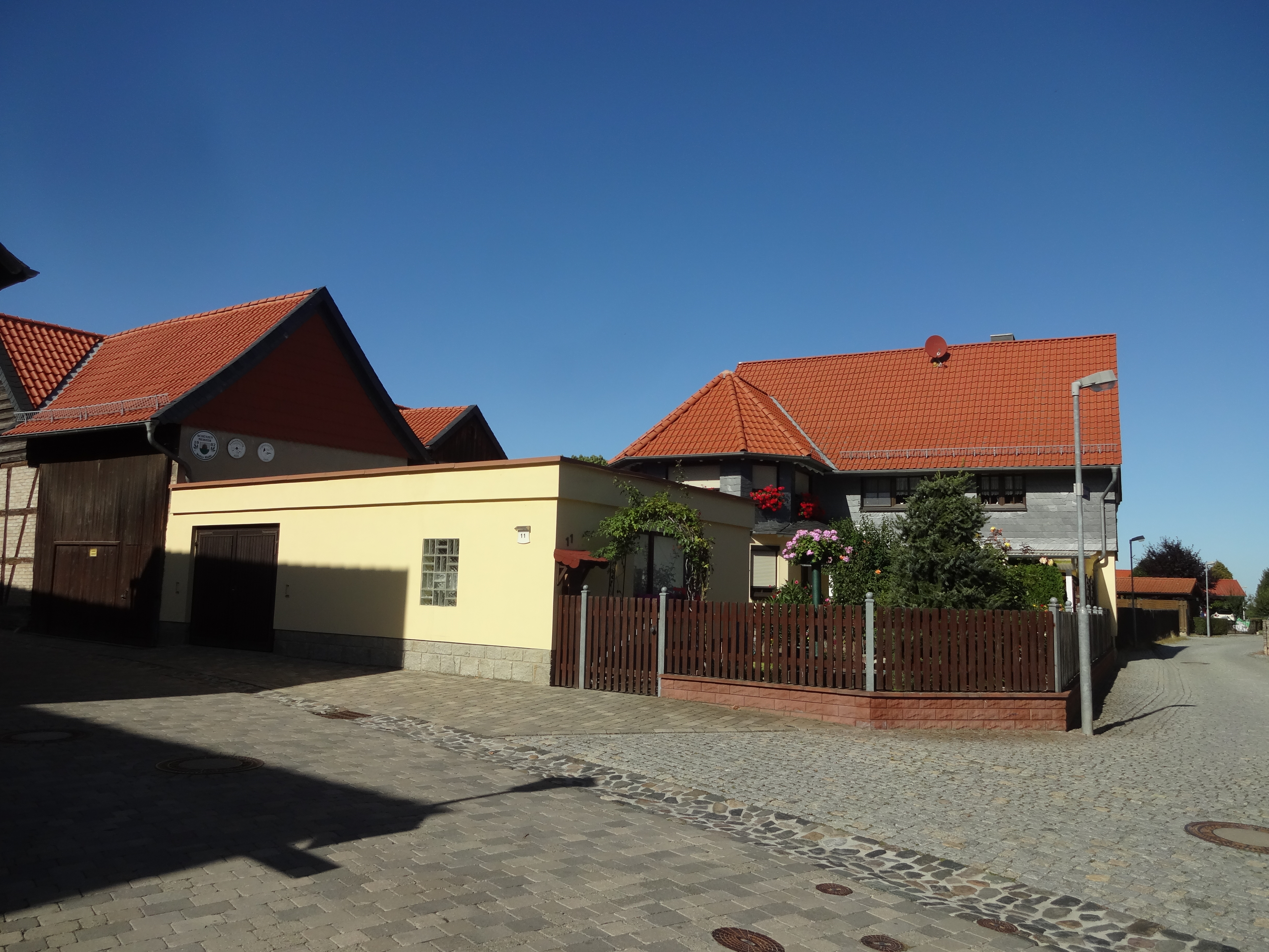 ehemals denkmalgeschützter Bauernhof in der Hauptstraße 11 in Drübeck